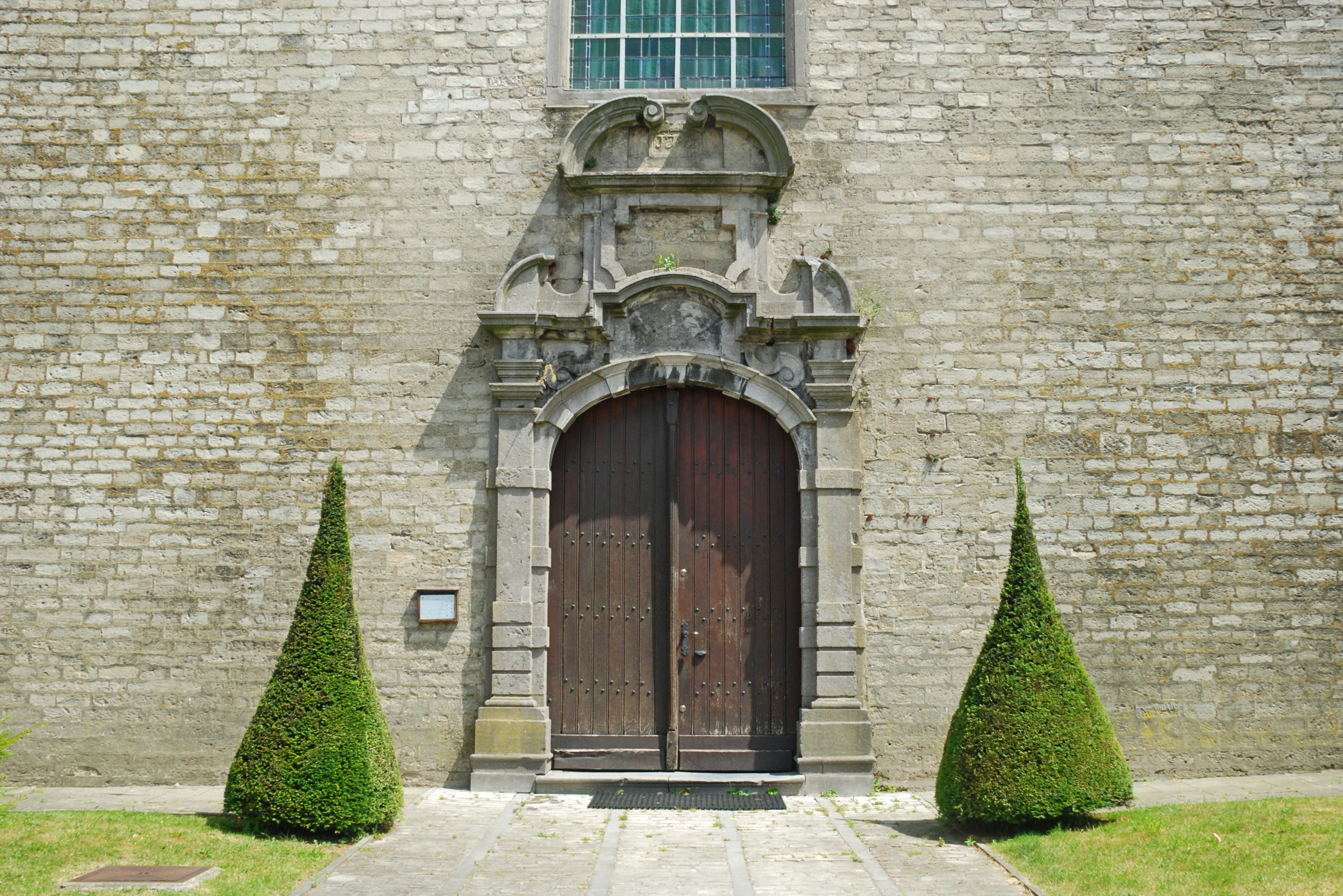 Belgique - Brabant flamand - Wezembeek-Oppem - Église Saint-Pierre This photo of immovable heritage has been taken in the Flemish Region